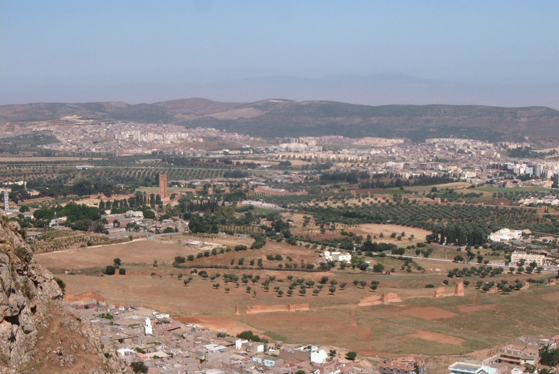 Le site de Mansourah à Tlemcen